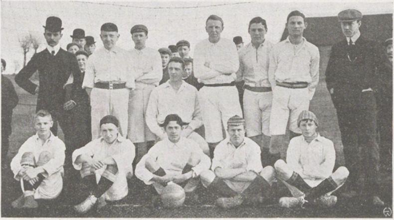 Foto van de Rotterdamse voetbalvereniging Achilles begin 1908. Zittend linksonder J.Noorduijn